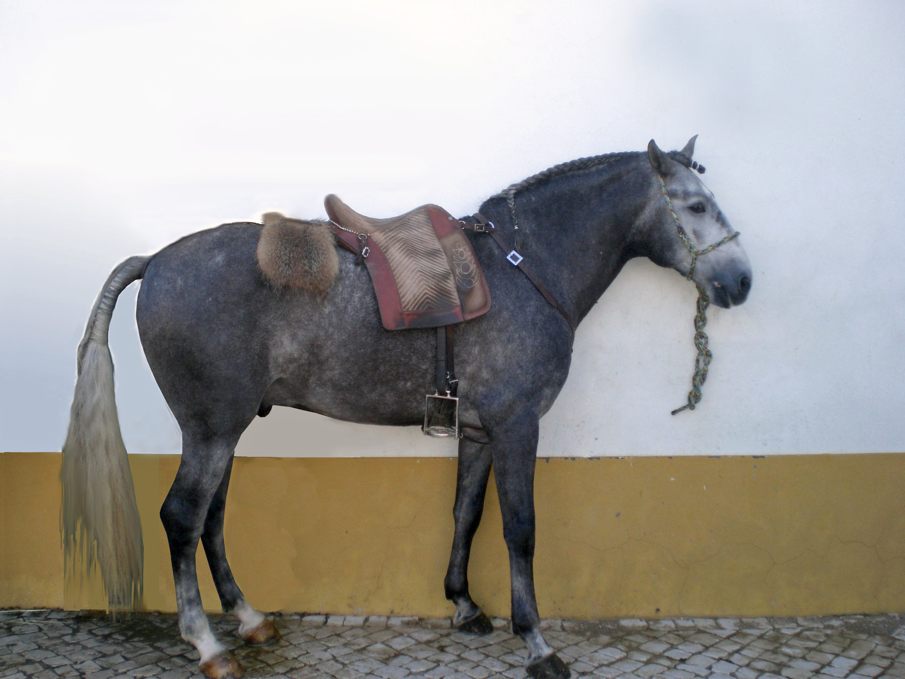 cheval lusitanien